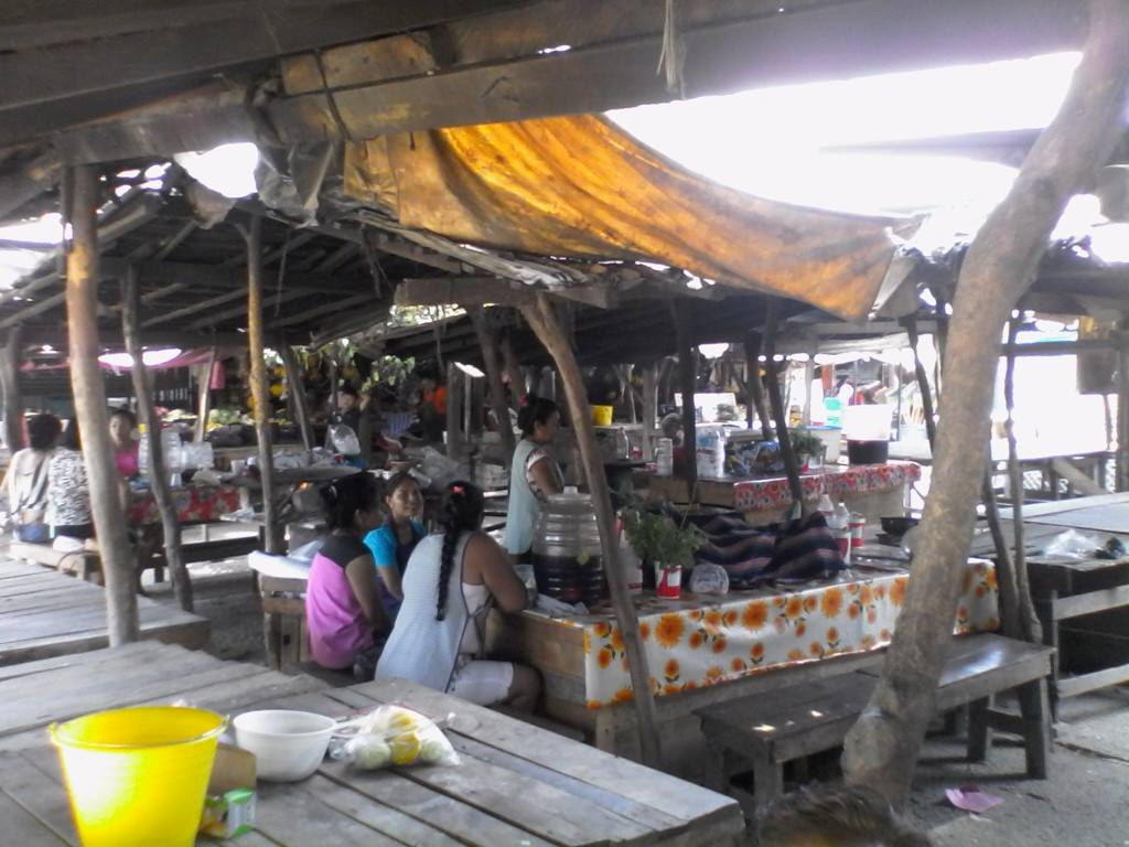 Mercado de Tres Palos, Acapulco, Guerrero